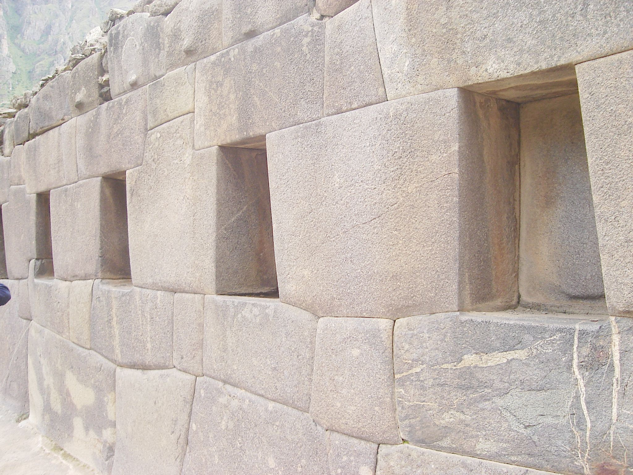 Foto tirada por mim, em Ollantaytambo.